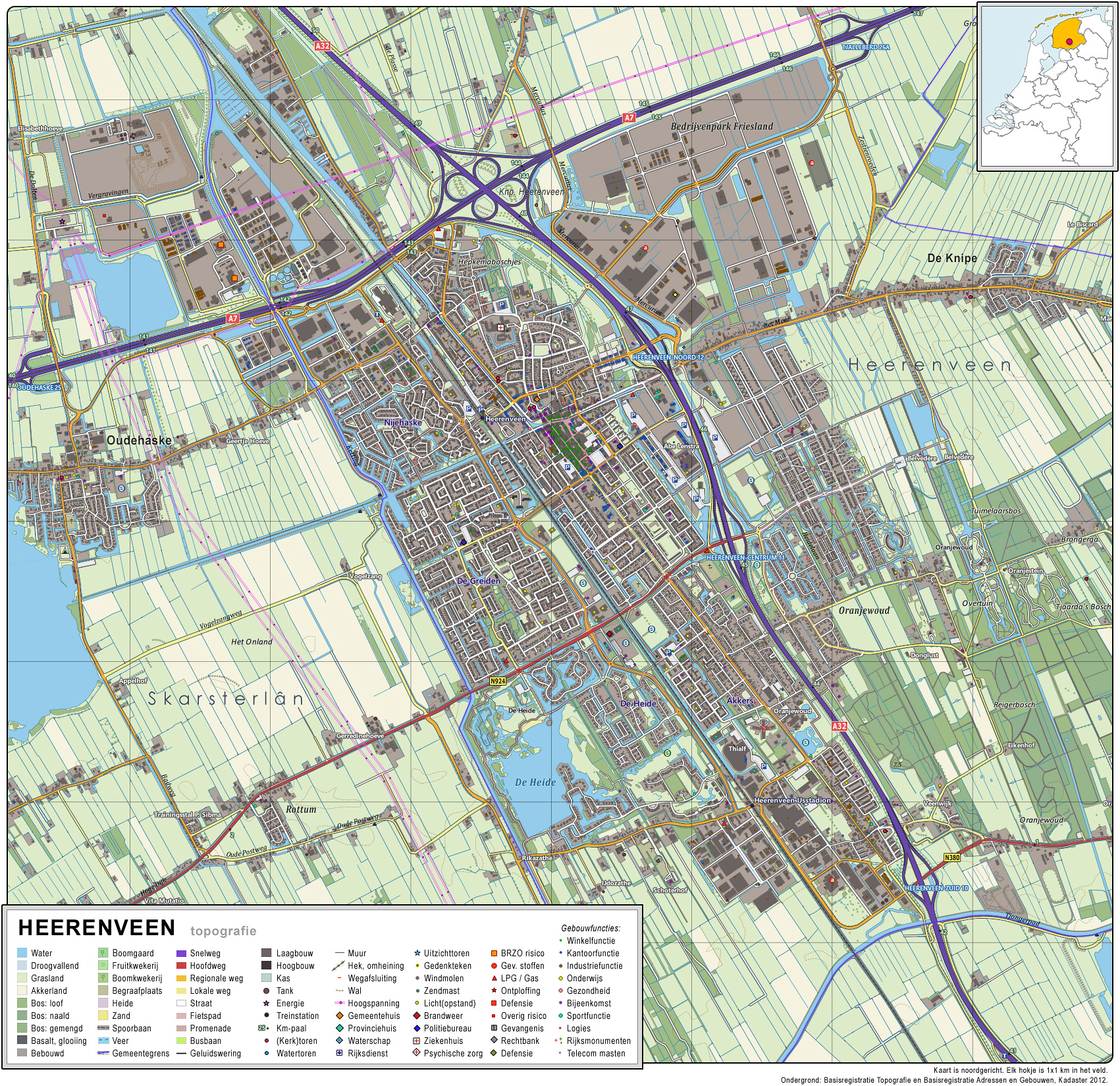 Topografisch beeld van de stad Heerenveen. Op basis van de GML open geodata van de BRT/Top10NL (basisregistratie Topografie, Kadaster 2012), vrijgegeven door Kadaster op 30-11-2012 onder de Creative Commons BY licentie. Gebouwvlakken vanuit Open Geodata BAG extract (december 2012). Samenstelling en kleurenschema: Jan-Willem van Aalst.